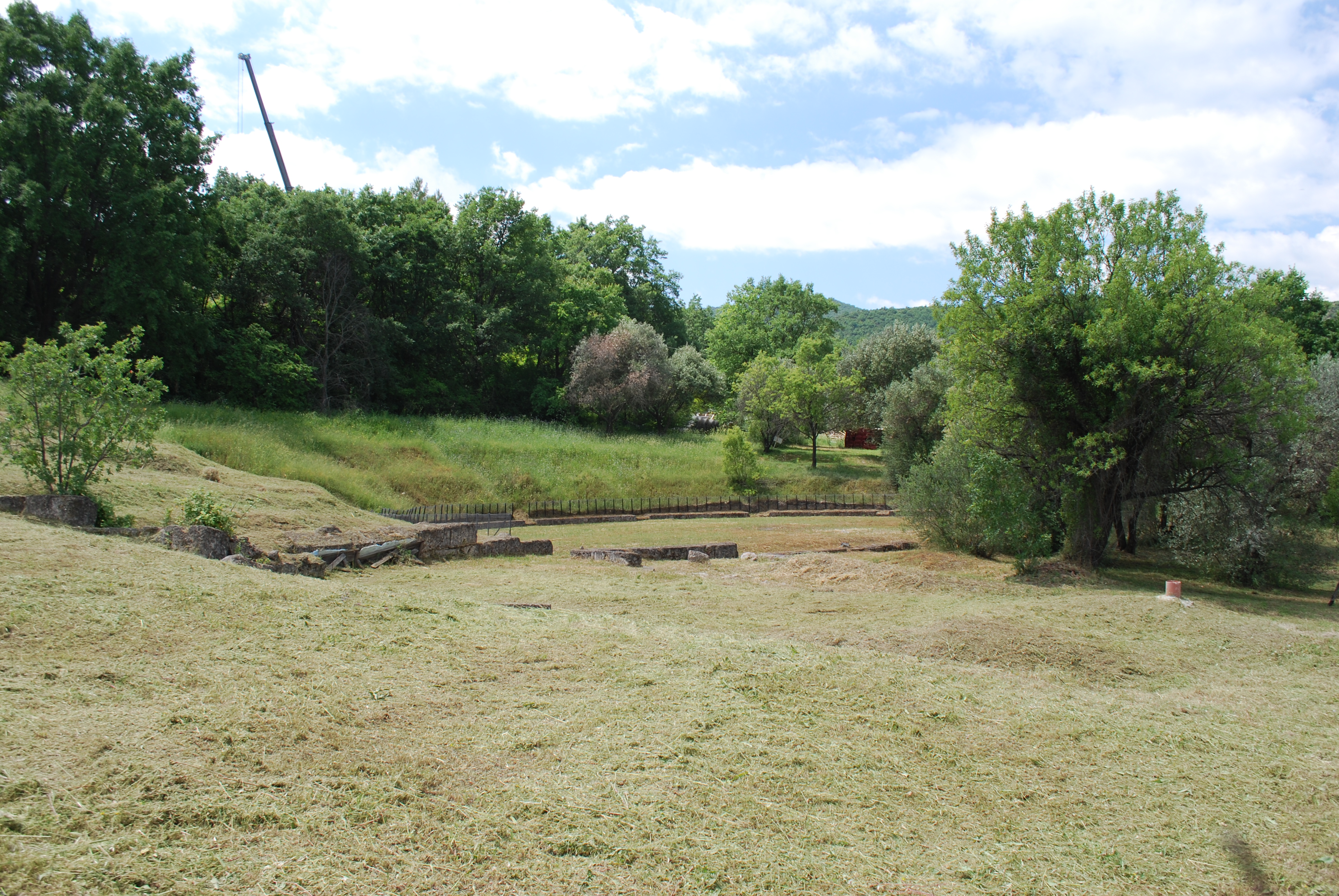 Vue de Vergina.